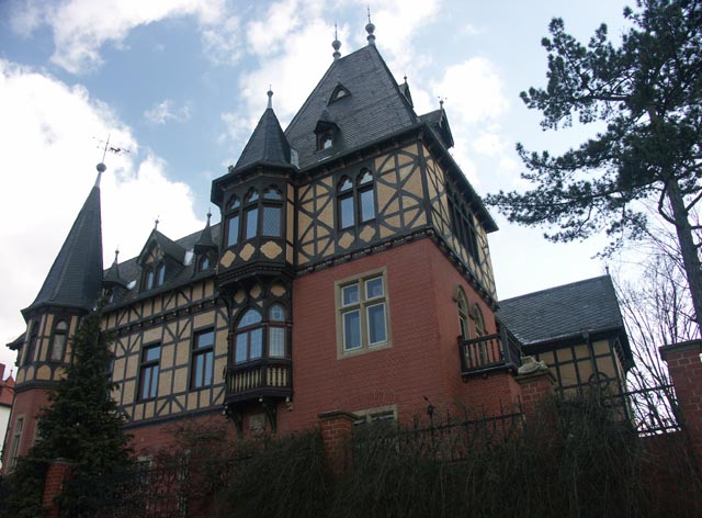 Solmsschlösschen im Stadtbezirk Südost.